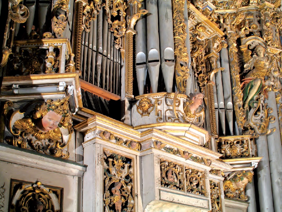 Gröninger Orgel der Martinikirche in Halberstadt, Sachsen-Anhalt, Deutschland